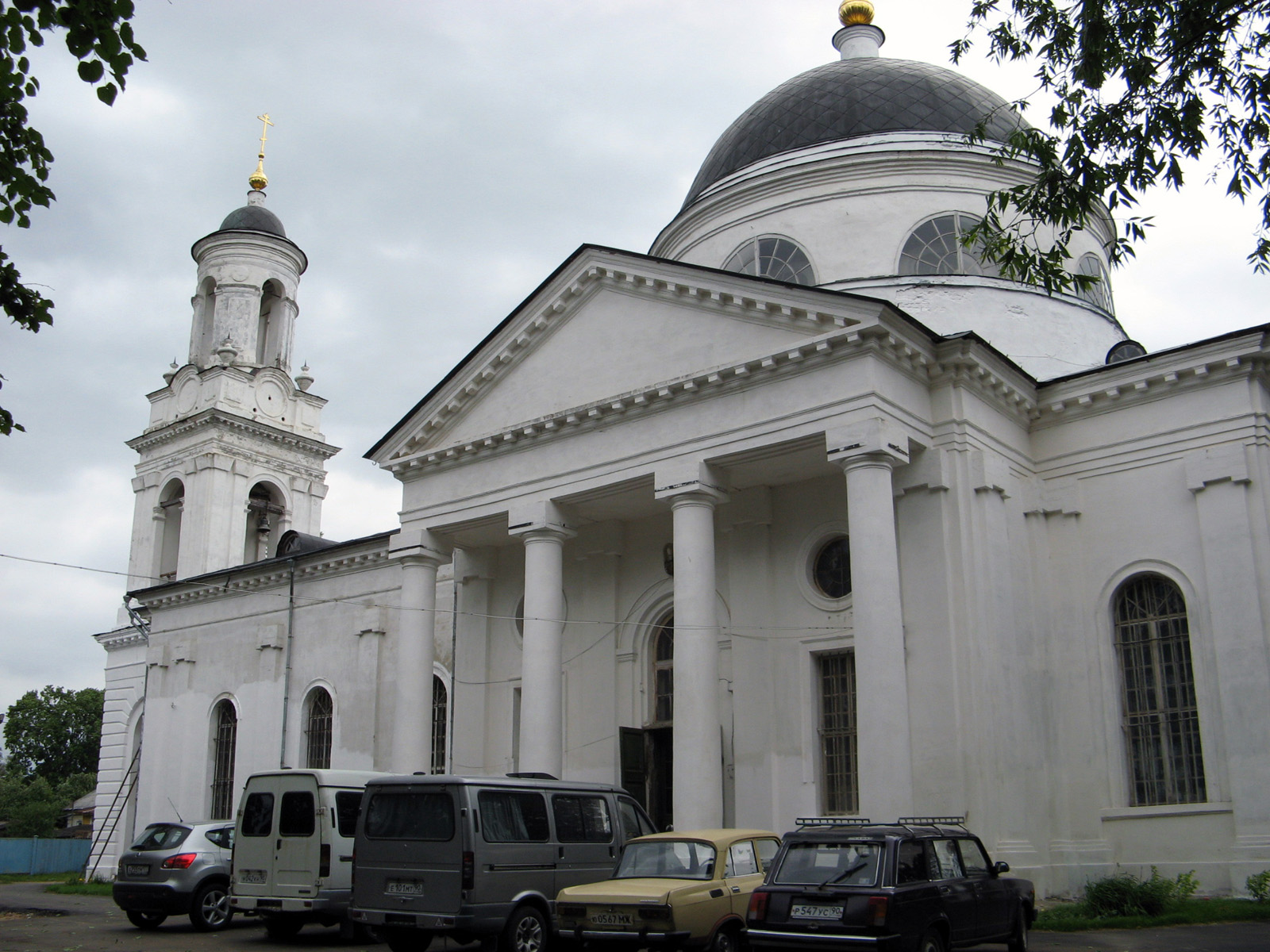 Храм Иоанна Предтечи в пос. Фряново Щёлковского района Московской области